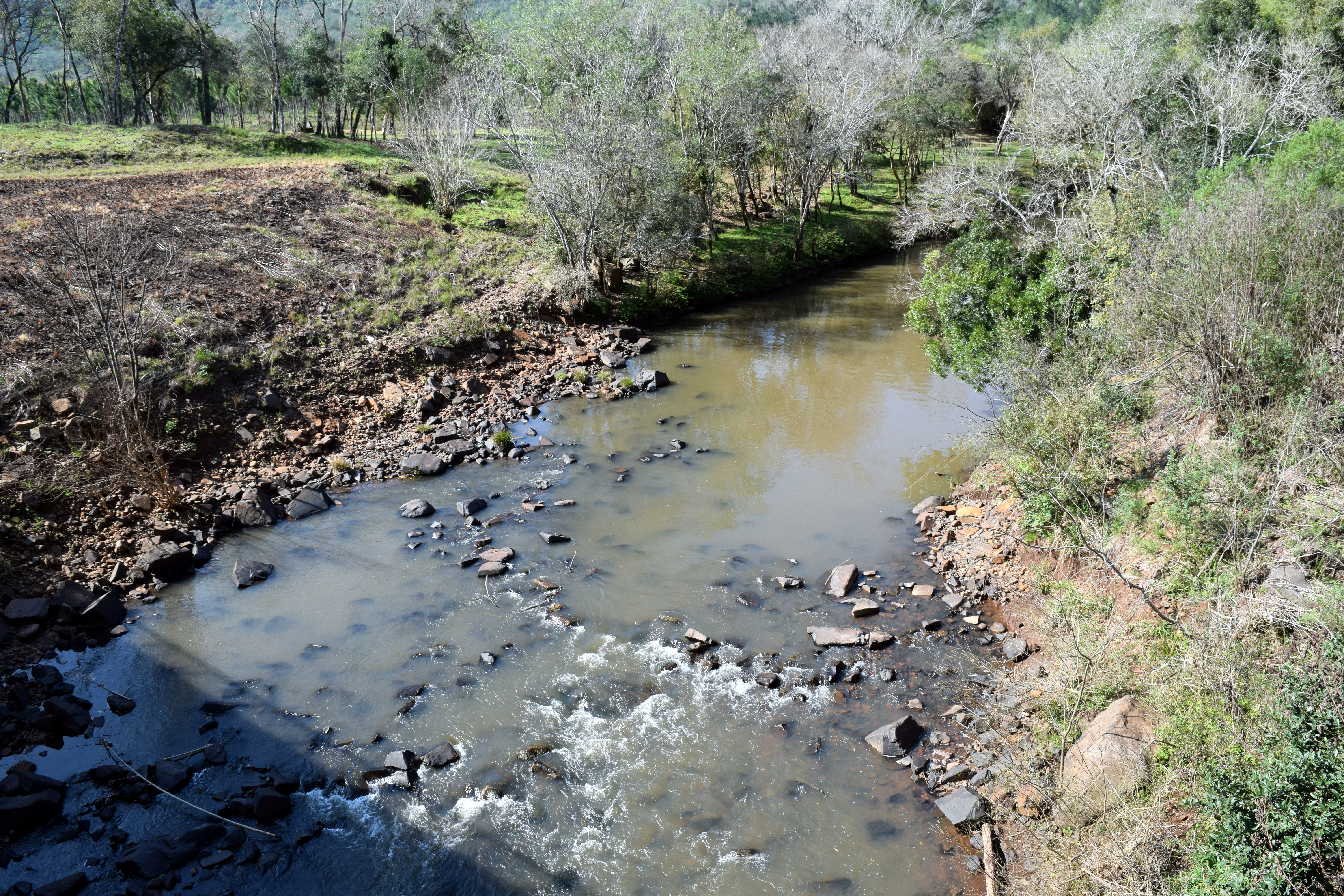 Saltos del Chapá en el arroyo homónimo en la localidad de Colonia Alberdi, provincia de Misiones.